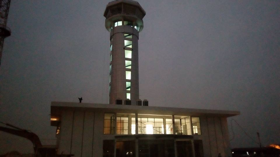 Đài Kiểm soát không lưu mới tại Cảng hàng không quốc tế Cát Bi